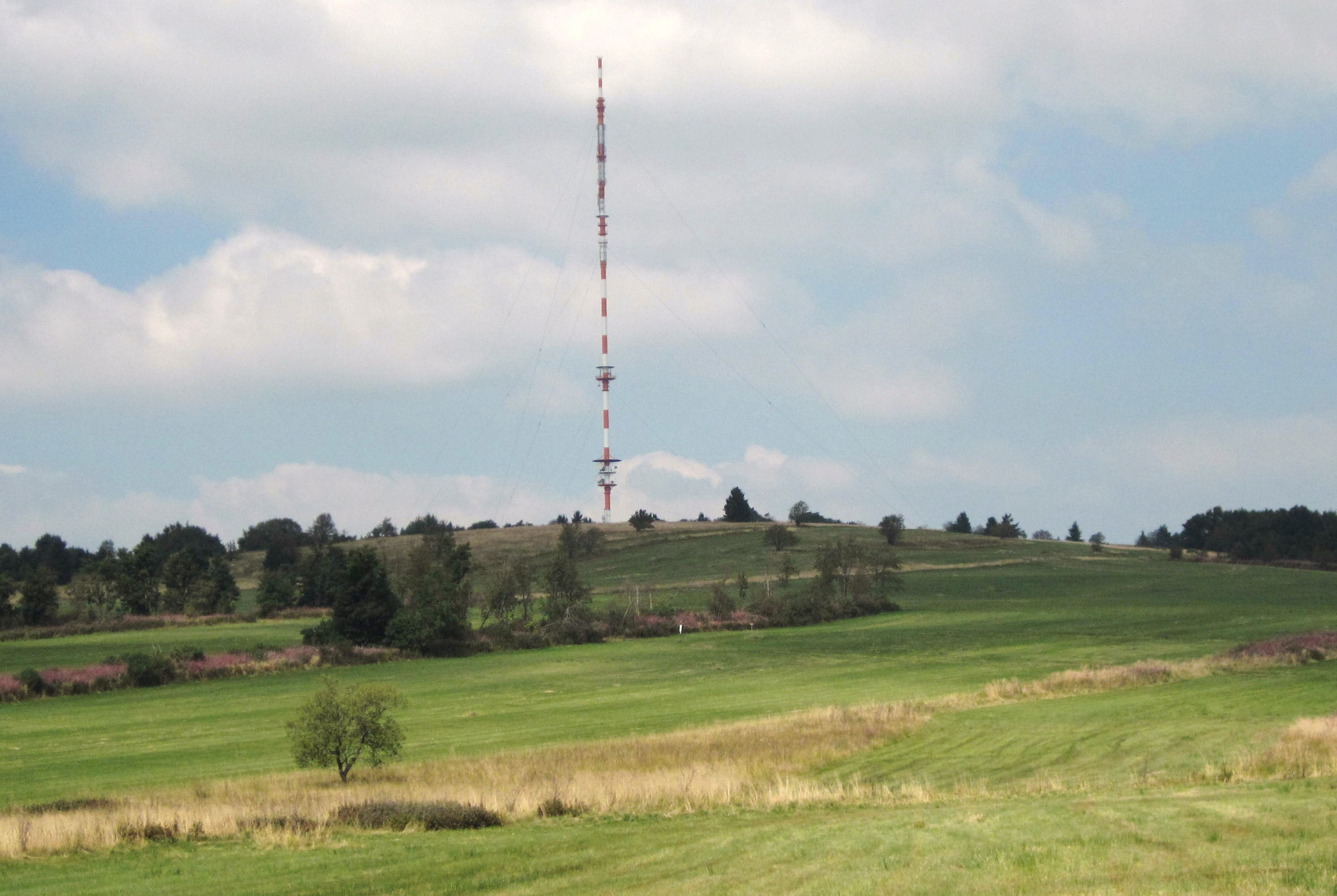 Der Sendemast auf dem Westgipfel desHeidelsteins